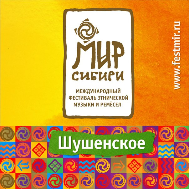 Style